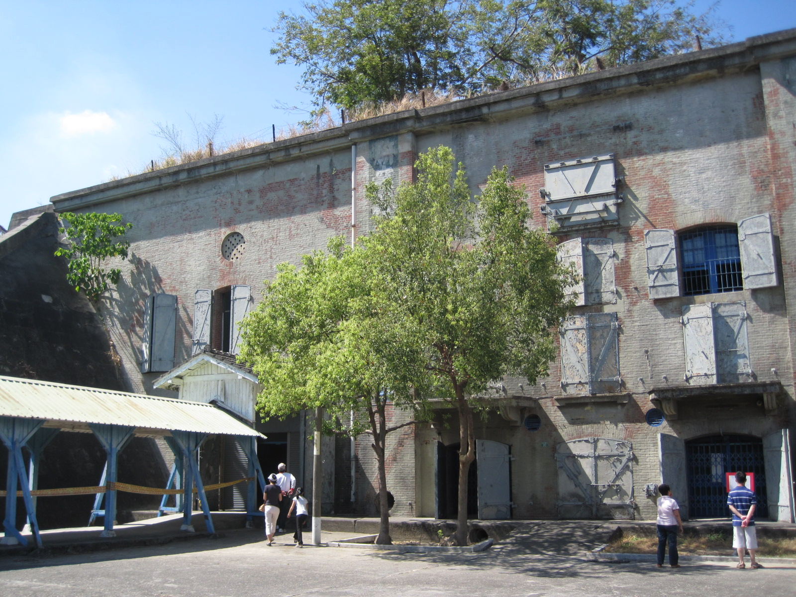 鳳山明德訓練班碉堡